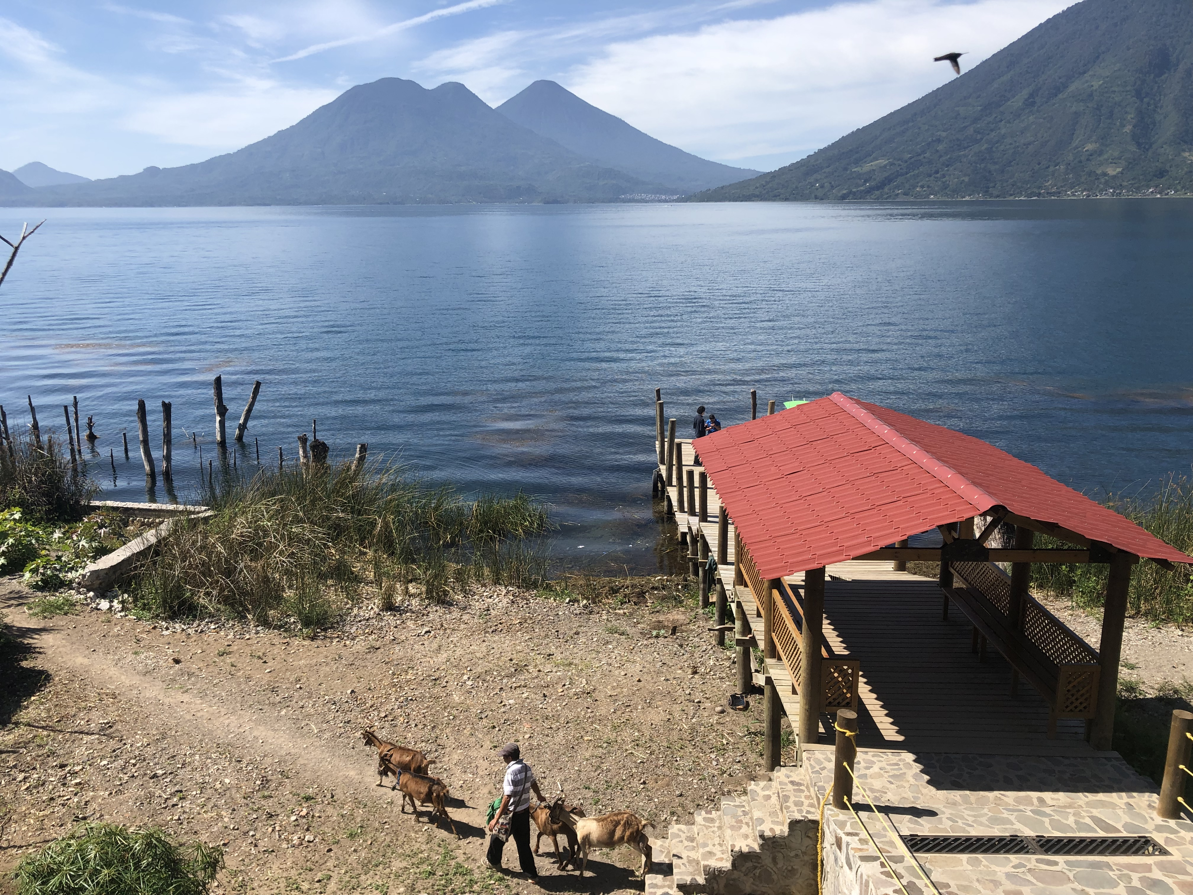 San Marcos La Laguna, débarcadère